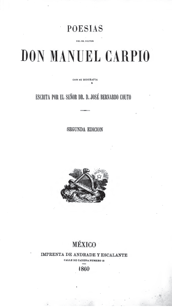 Portada del libro Poesias del Dr don Manuel CarpioPNG